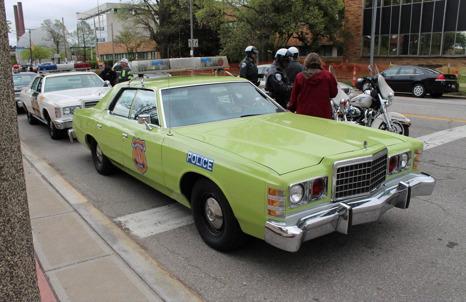 Ein Ford LTD (Modelljahr 1978) als Polizeiwagen in der Innenstadt von Cleveland (Ohio)